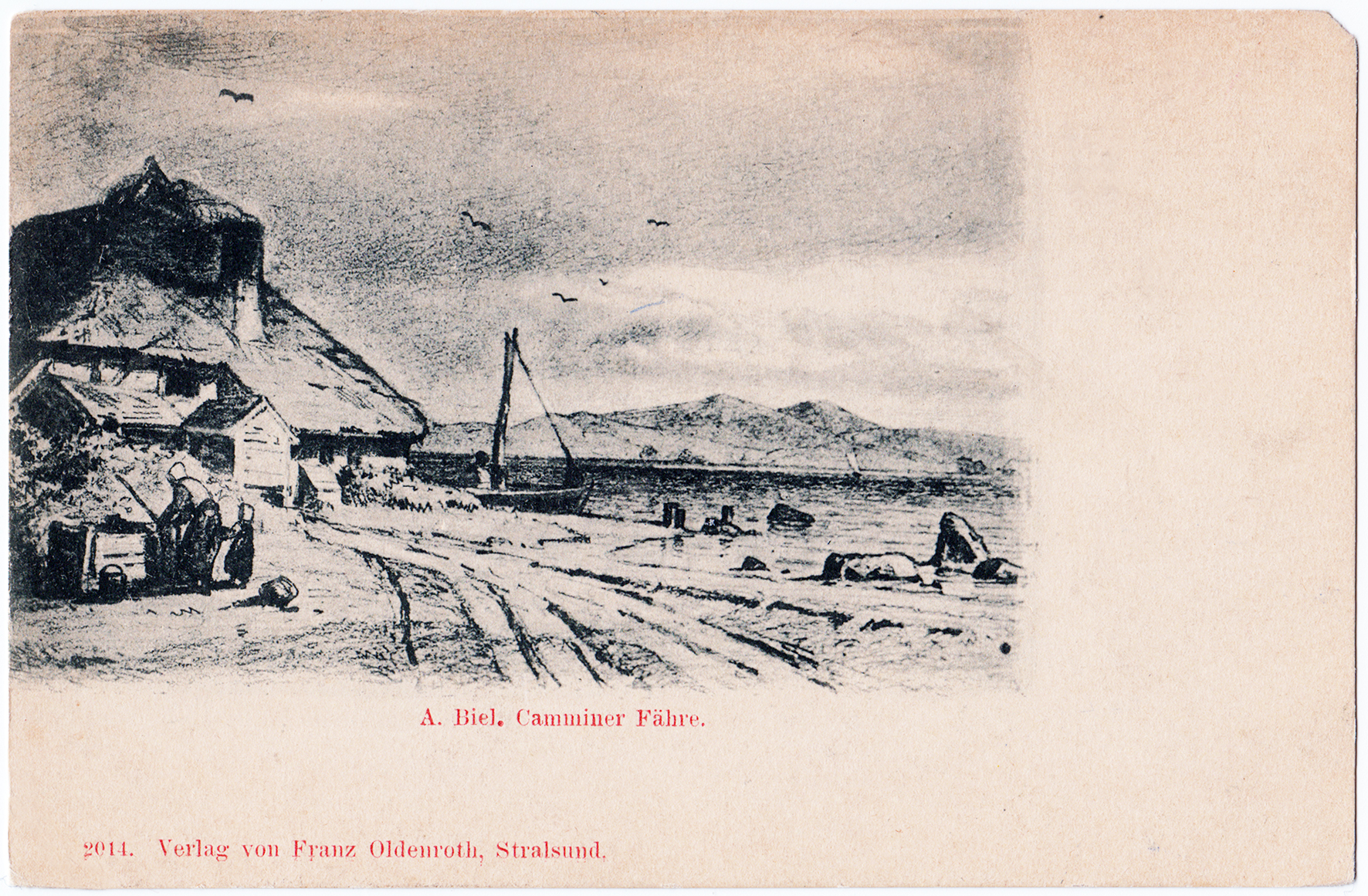 Ansichtskarte nach einer Bleistiftzeichnung von Antonie Biel. Die Fähre verband ursprünglich den Rügener Inselkern mit der Halbinsel Wittow und verkehrte zwischen Cammin und Vieregge